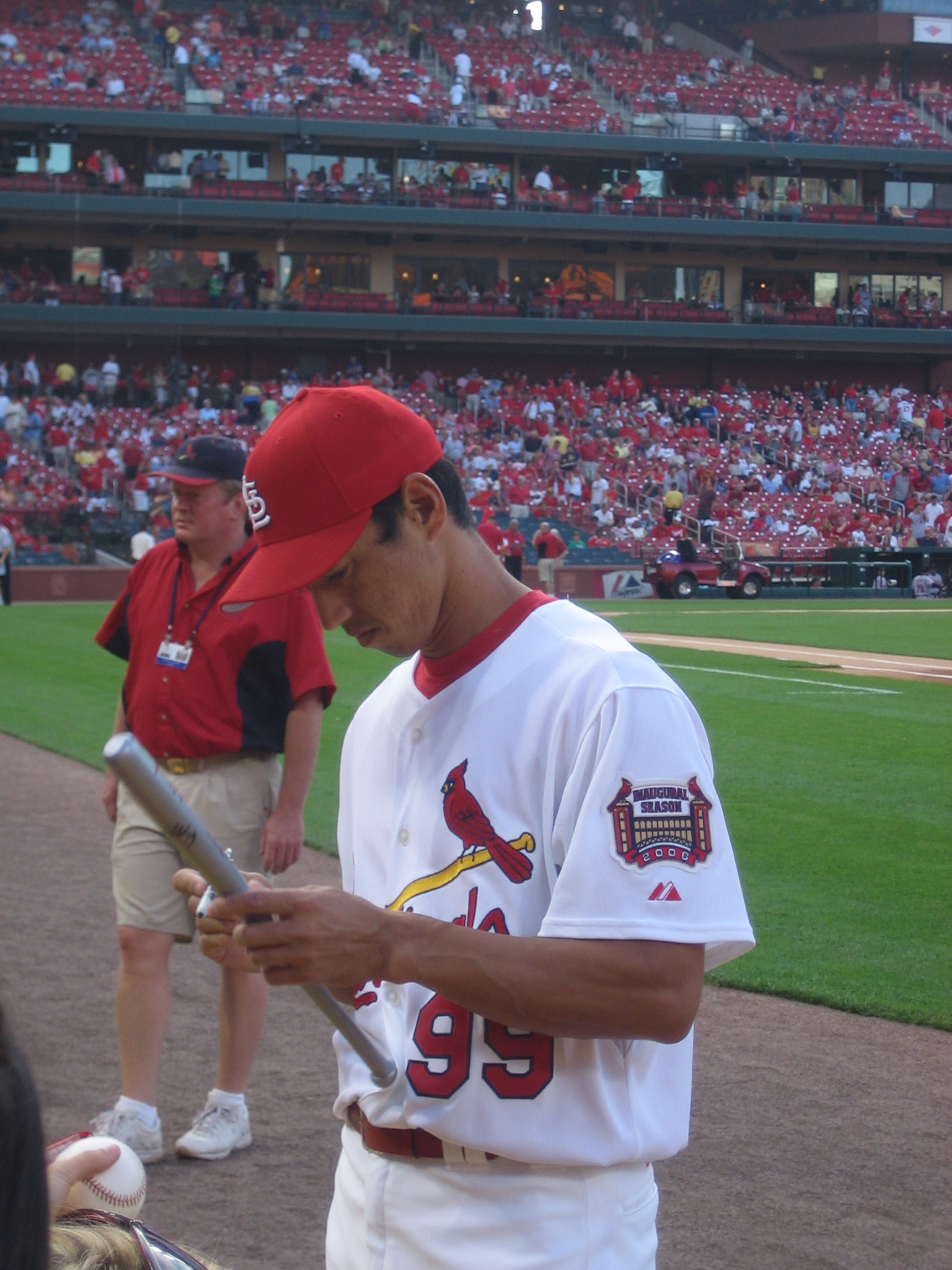 So Taguchi 01:12, 7 June 2007 . . Lindell005 . . 1,536×2,048 (792 KB)